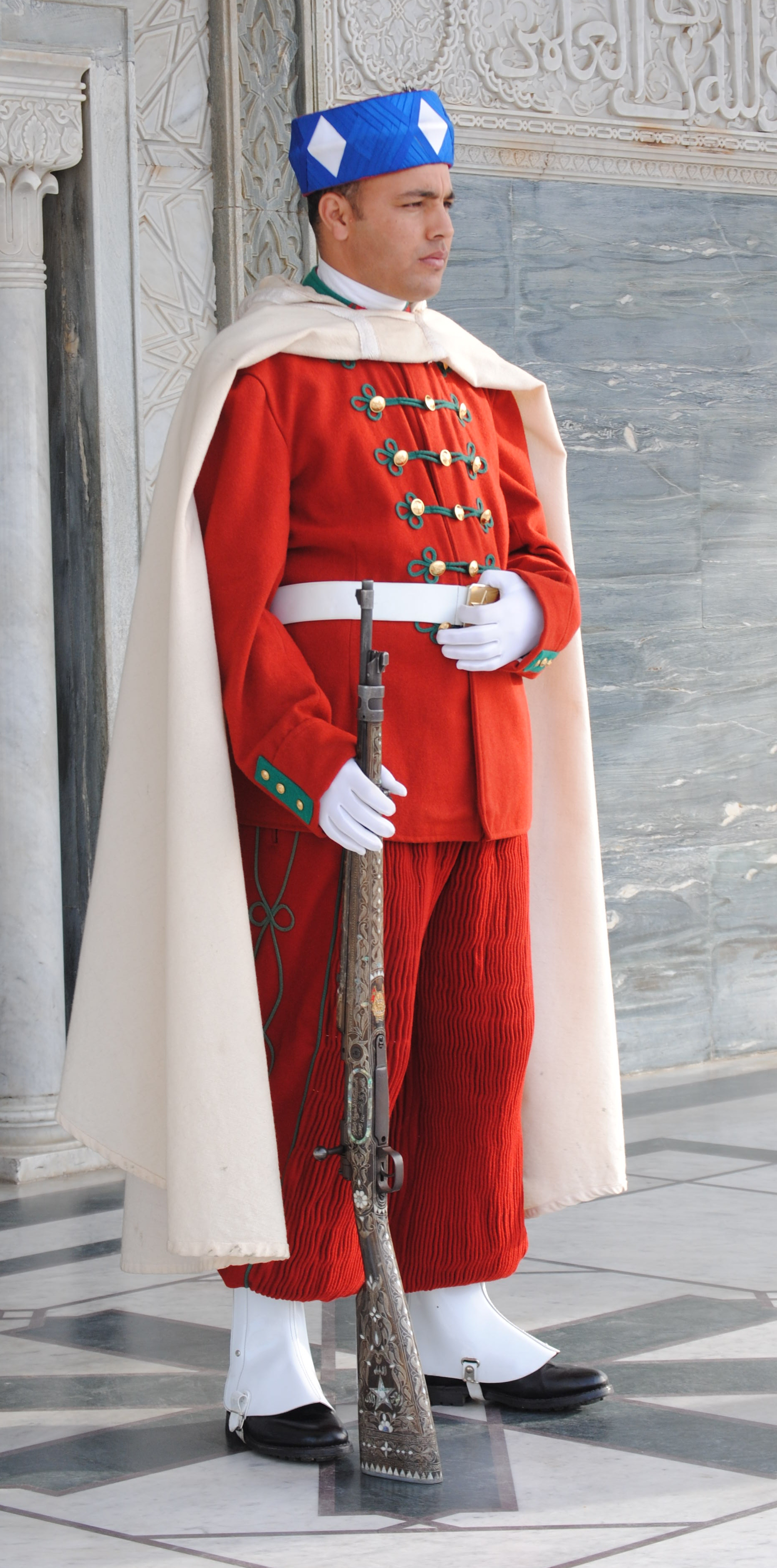 Garde Royal Marocaine devant le mausolée Mohamed V à Rabat